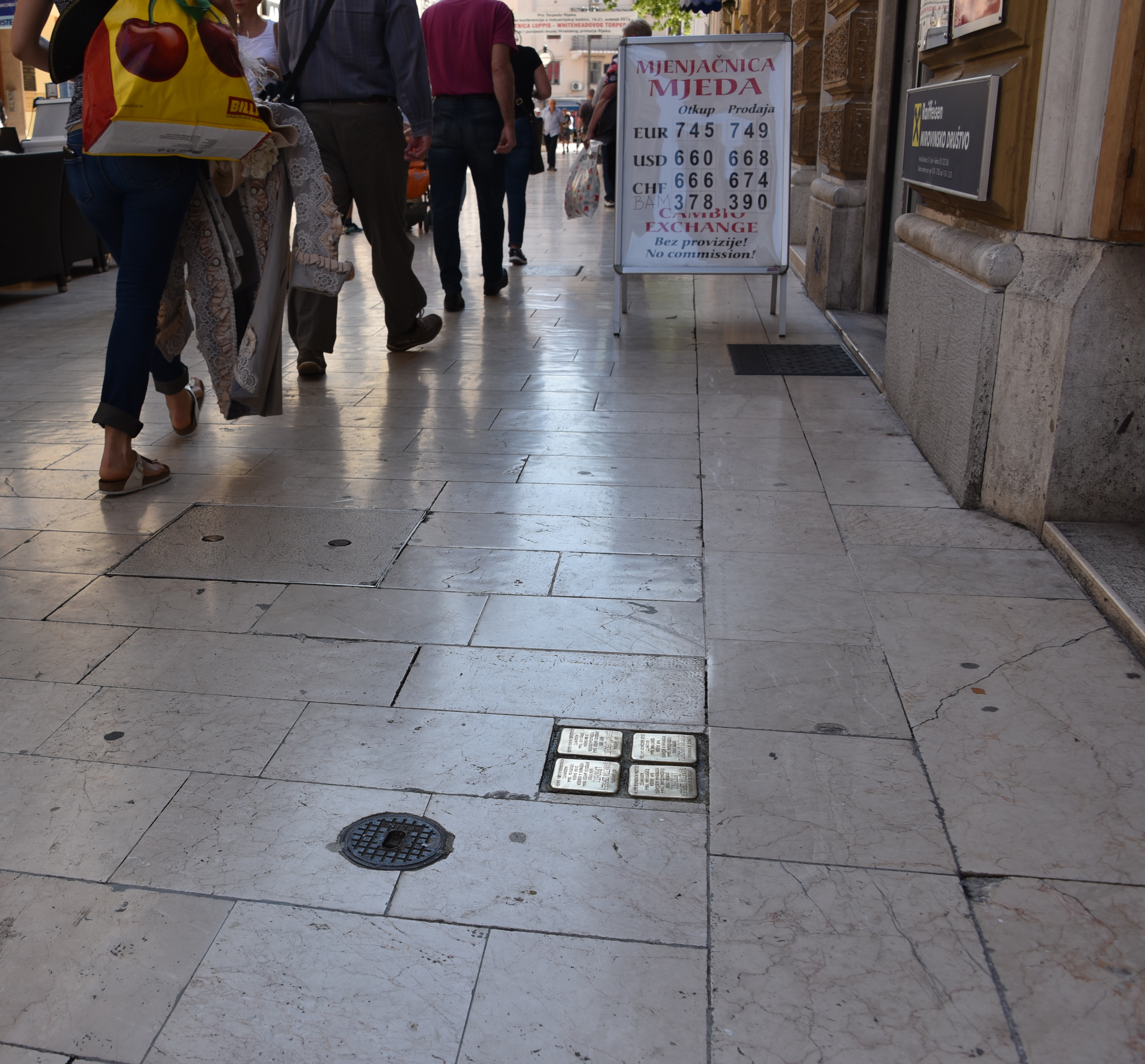 Stolpersteine in Rijeka für Familie Lipschitz auf rumänich und italienisch, Ante Starčevića 5